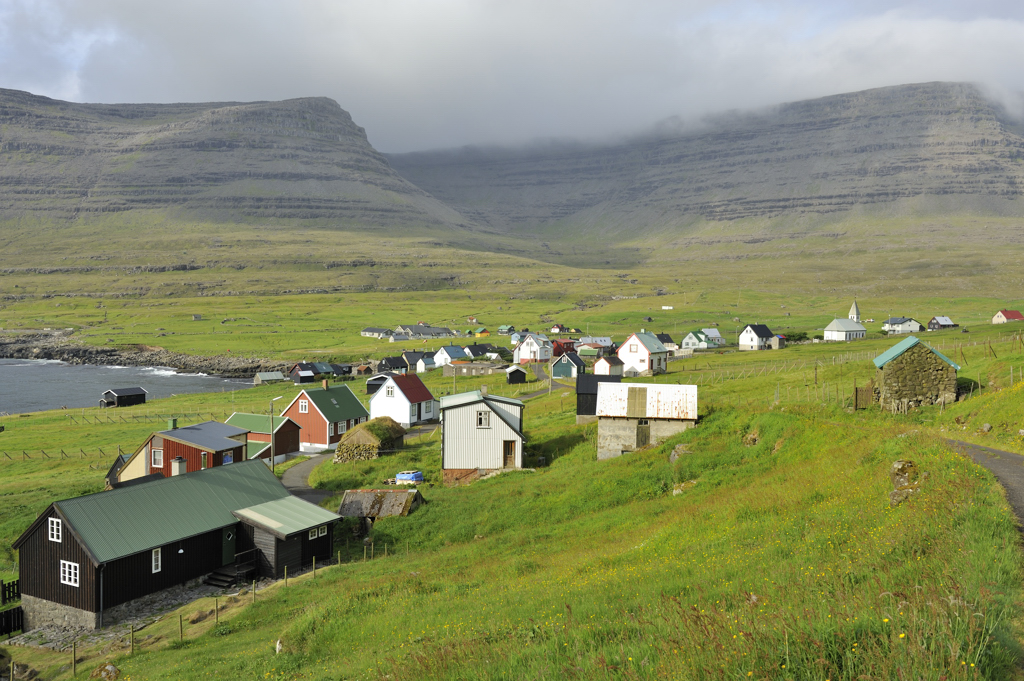 Den Namen Schweineinsel verdankt Svínoy möglicherweise der Schweinezucht, die auf den Färöern im Mittelalter weit verbreitet war. Anderen Quellen zufolge könnten die ersten Siedler von einer gleichnamigen norwegischen Insel stammen. Svínoy ist eine der sogenannten Außeninseln an der Peripherie der Färöer, die nur per Schiff oder Hubschrauber erreicht werden können. In der Kirche von Svínoy befindet sich der vermutliche Grabstein von Svínoyar-Bjarni, dessen Schwester Guðrun der Färingersaga zufolge die Mutter des mächtigen Wikingerhäuptlings Tróndur í Gøtu war.